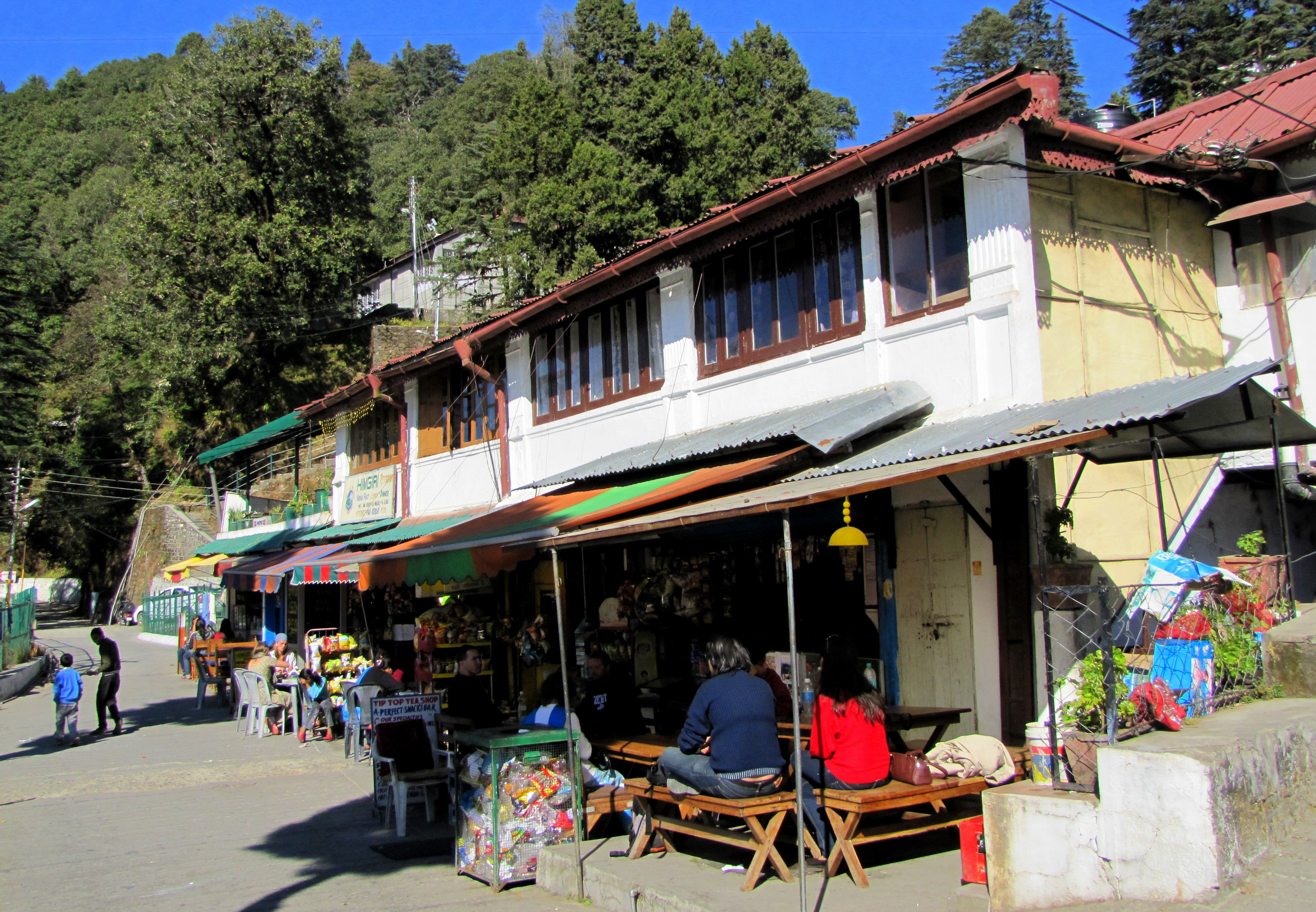 Char Dhukan